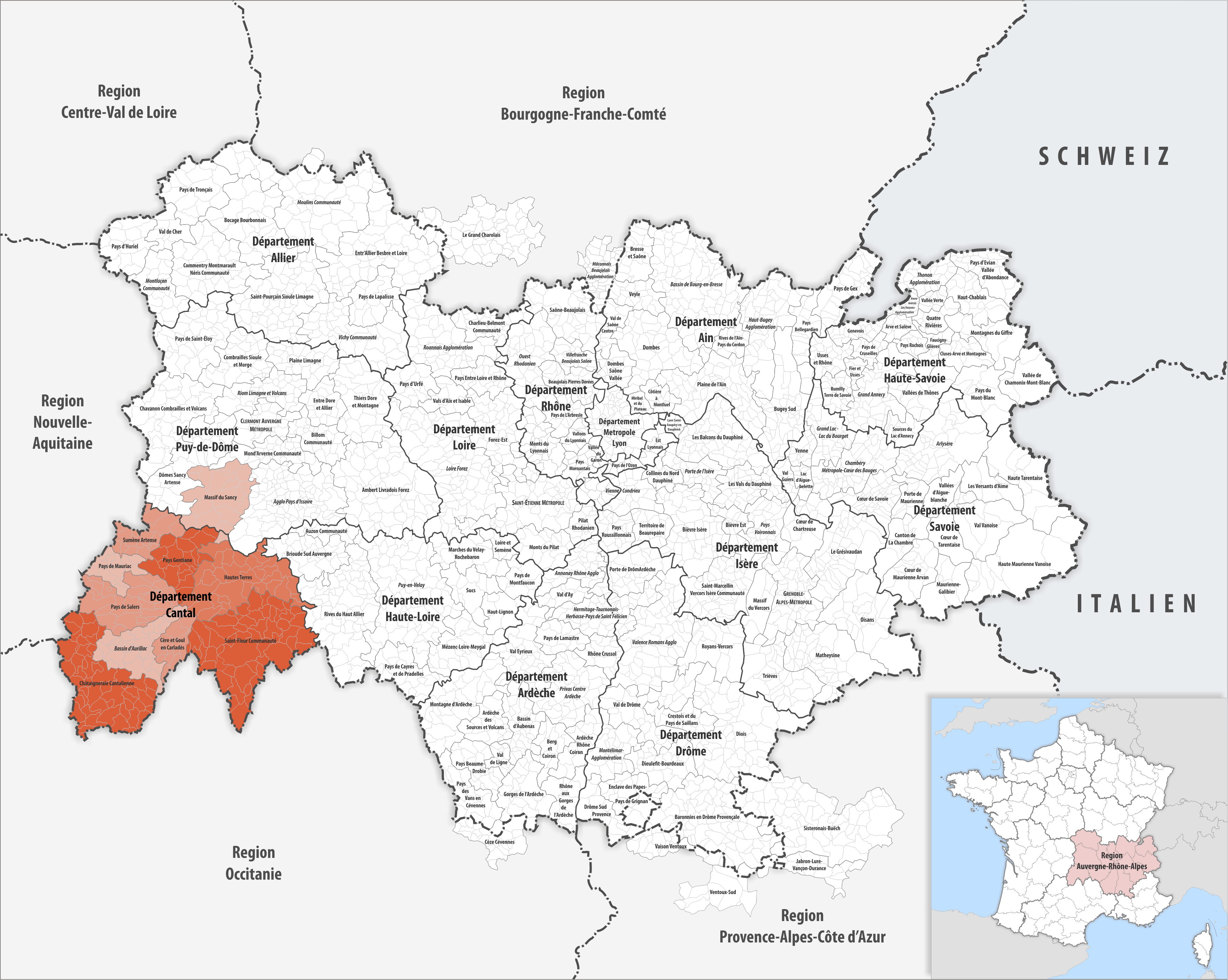 Gemeindeverbände im Département Cantal